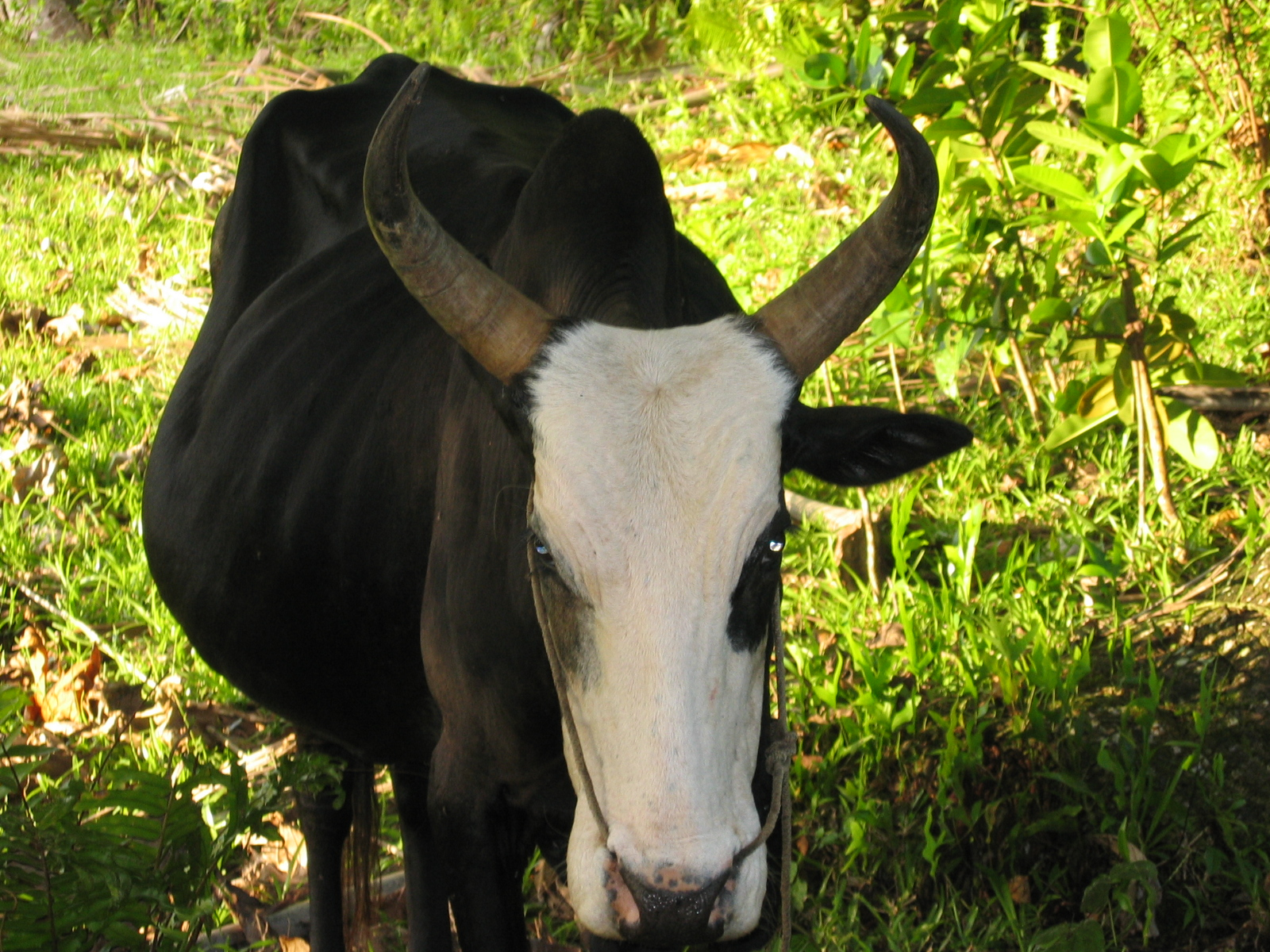 Un zébu amical